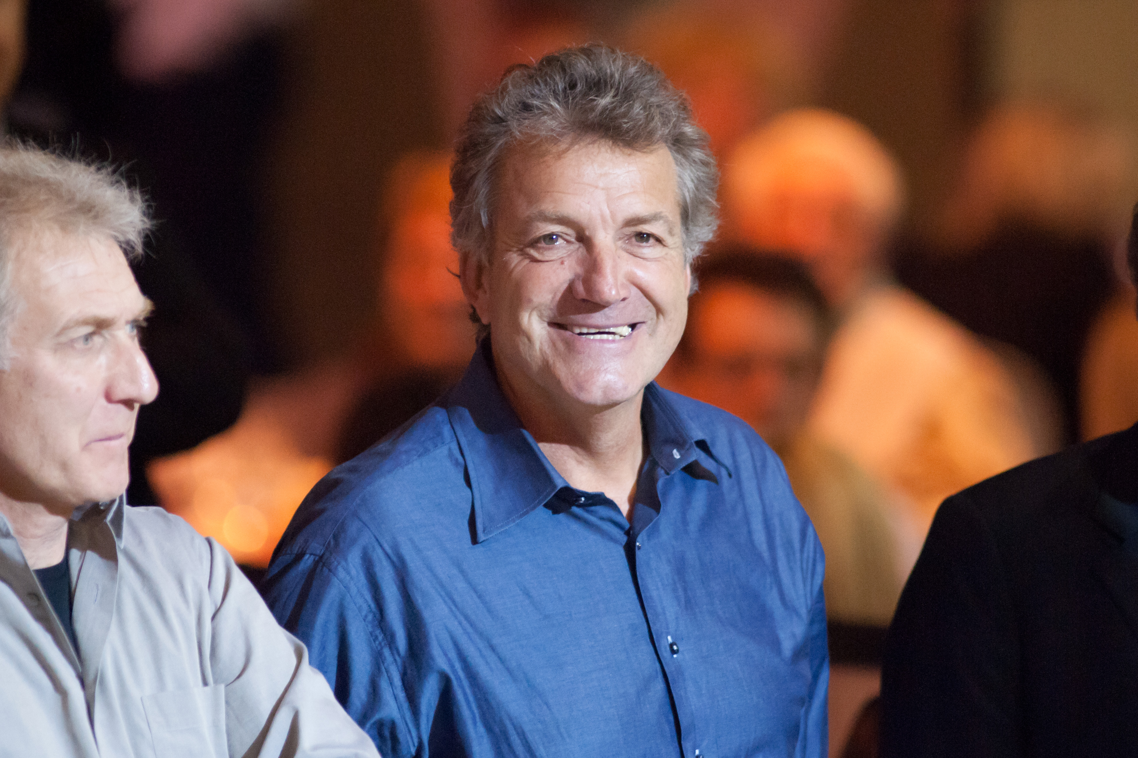 Jacques Michaud aux Six jours de Grenoble